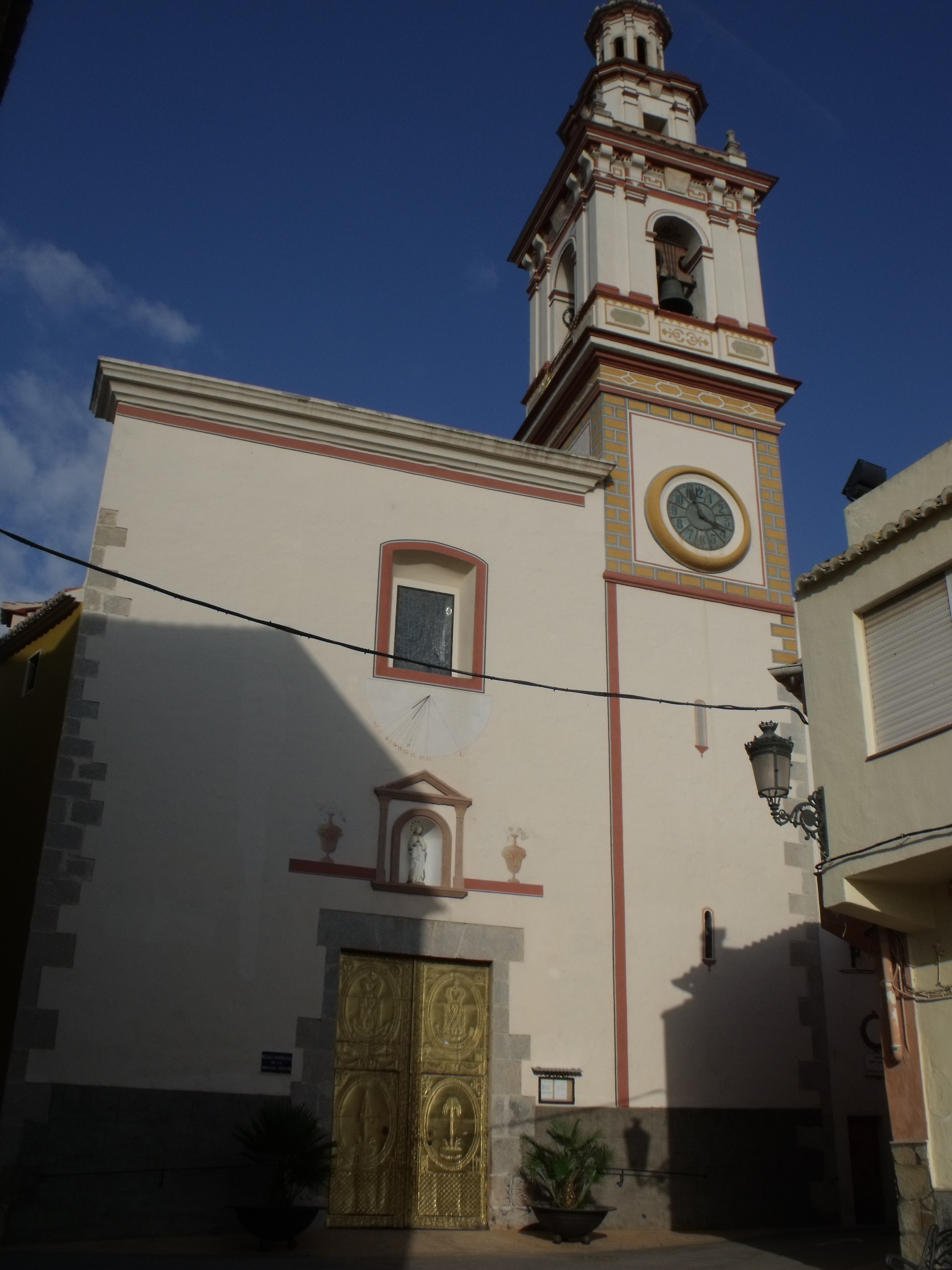 Iglesia de la Inmaculada Concepción. Albalat dels Tarongers.